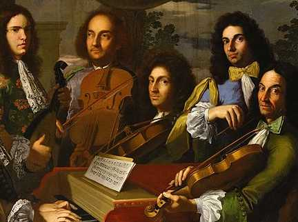 Quintet d'instrumet de Stradivari dab los musician de F. de'Medici sustot dab un vriulon ternor deus màgers